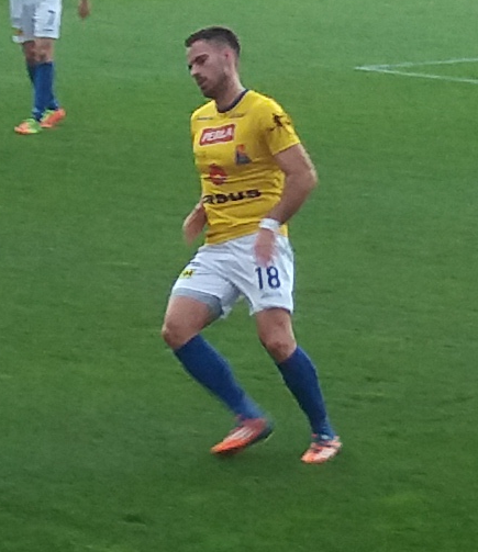 Kamil Stachyra - Motor Lublin 2017